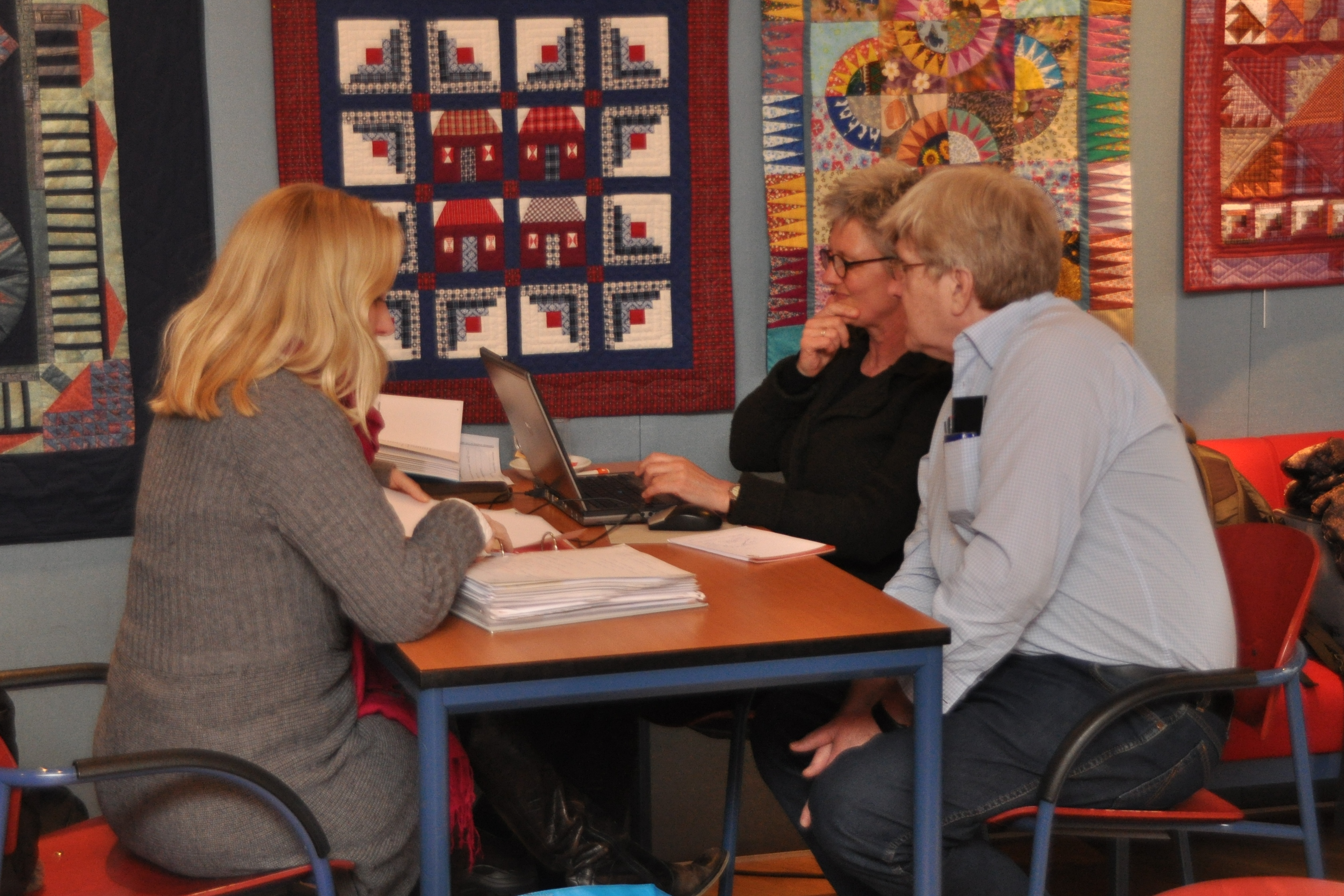 FNV Belastingservice aan het werk in Leiden in de Regenboog